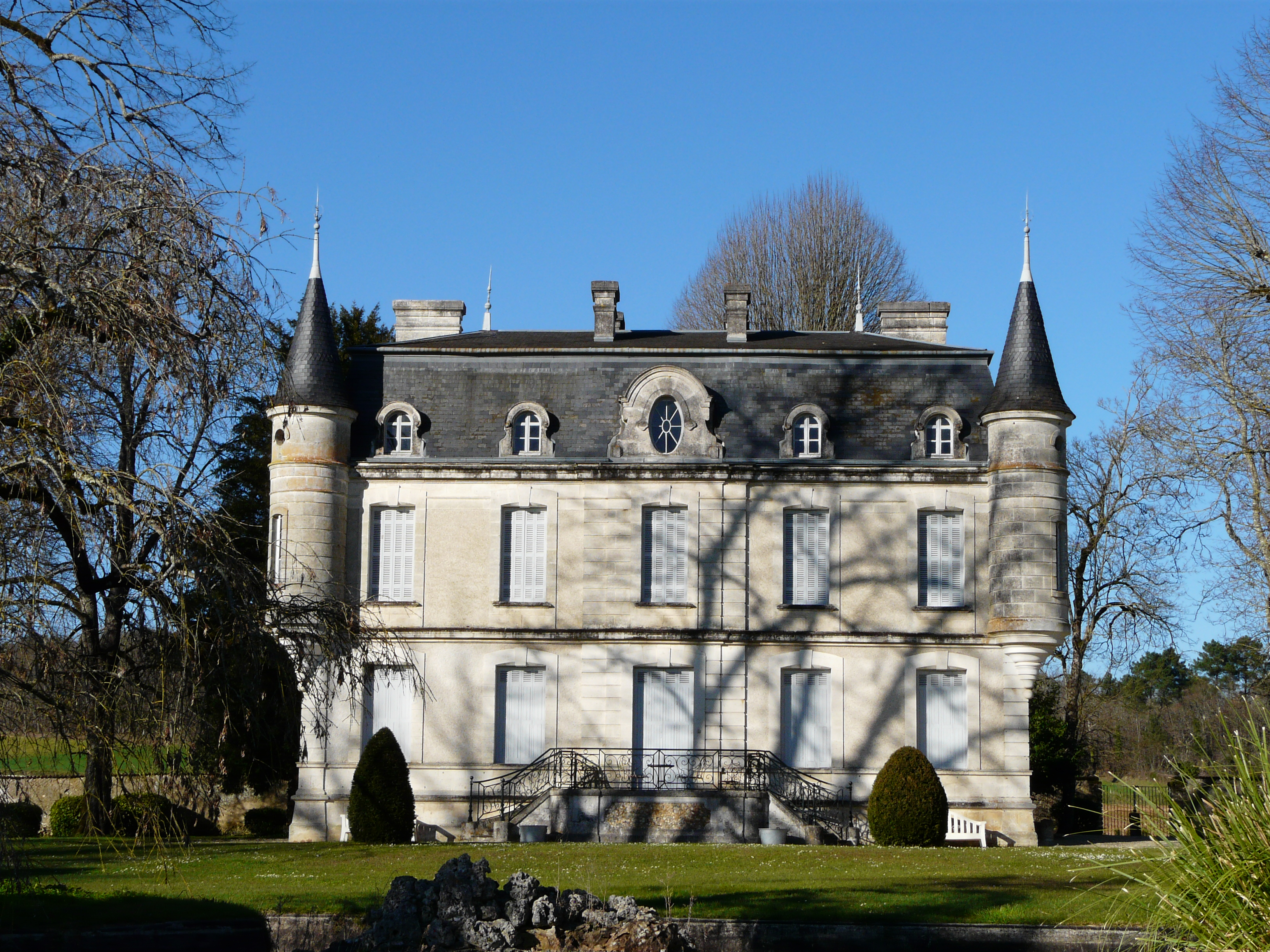 Le château de Saint-Vincent, Saint-Vincent-Jalmoutiers, Dordogne, France.